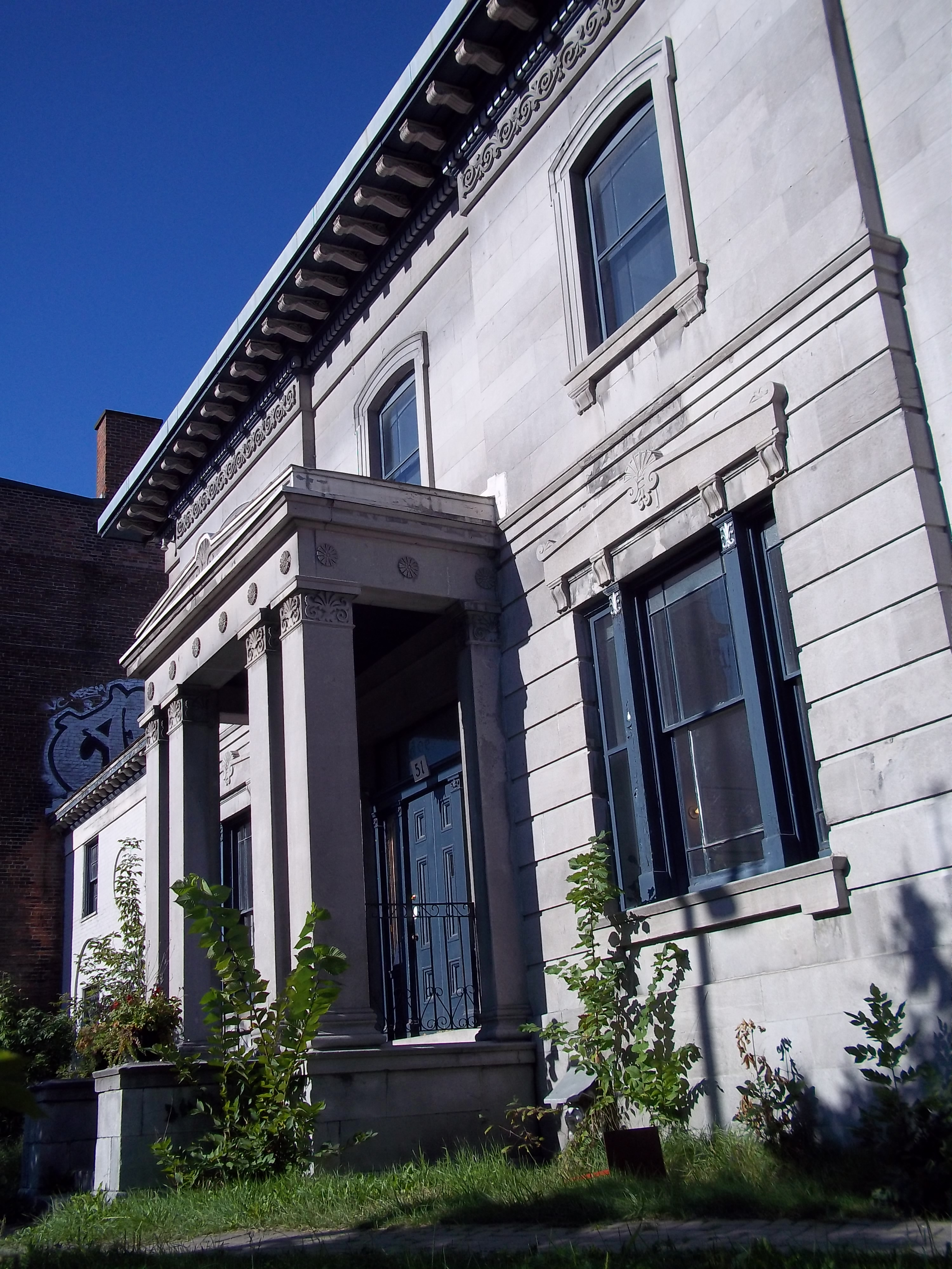 Maison William Collis-Meredith (Maison William-Notman), 51, rue Sherbrooke Ouest, Montréal Grand répertoire du patrimoine bâti de Montréal